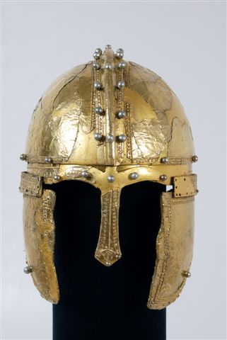 Шлем из Јарка. Трећи касноантички шлем из колекције Музеја Војводине. Пронађен 2006; премијерно приказан 12. маја 2009. Museum of Vojvodina Native nameМузеј ВојводинеLocationNovi SadCoordinates45° 15′ 23.57″ N, 19° 51′ 06.32″ E Established14 October 1847Web page control : Q6941048 VIAF: 231993869 LCCN: n2012009683 GND: 4283993-2 WorldCat institution QS:P195,Q6941048